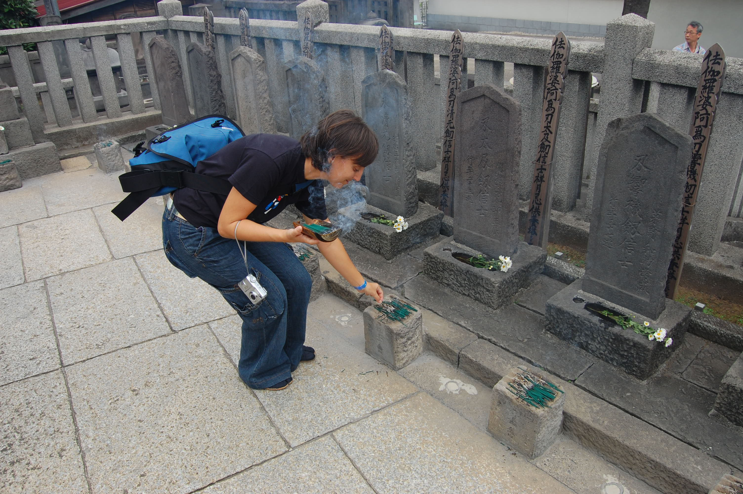 Poniendo incienso en las tumbas de los 47 Ronin, en el Templo Sengakuji, Tokyo.